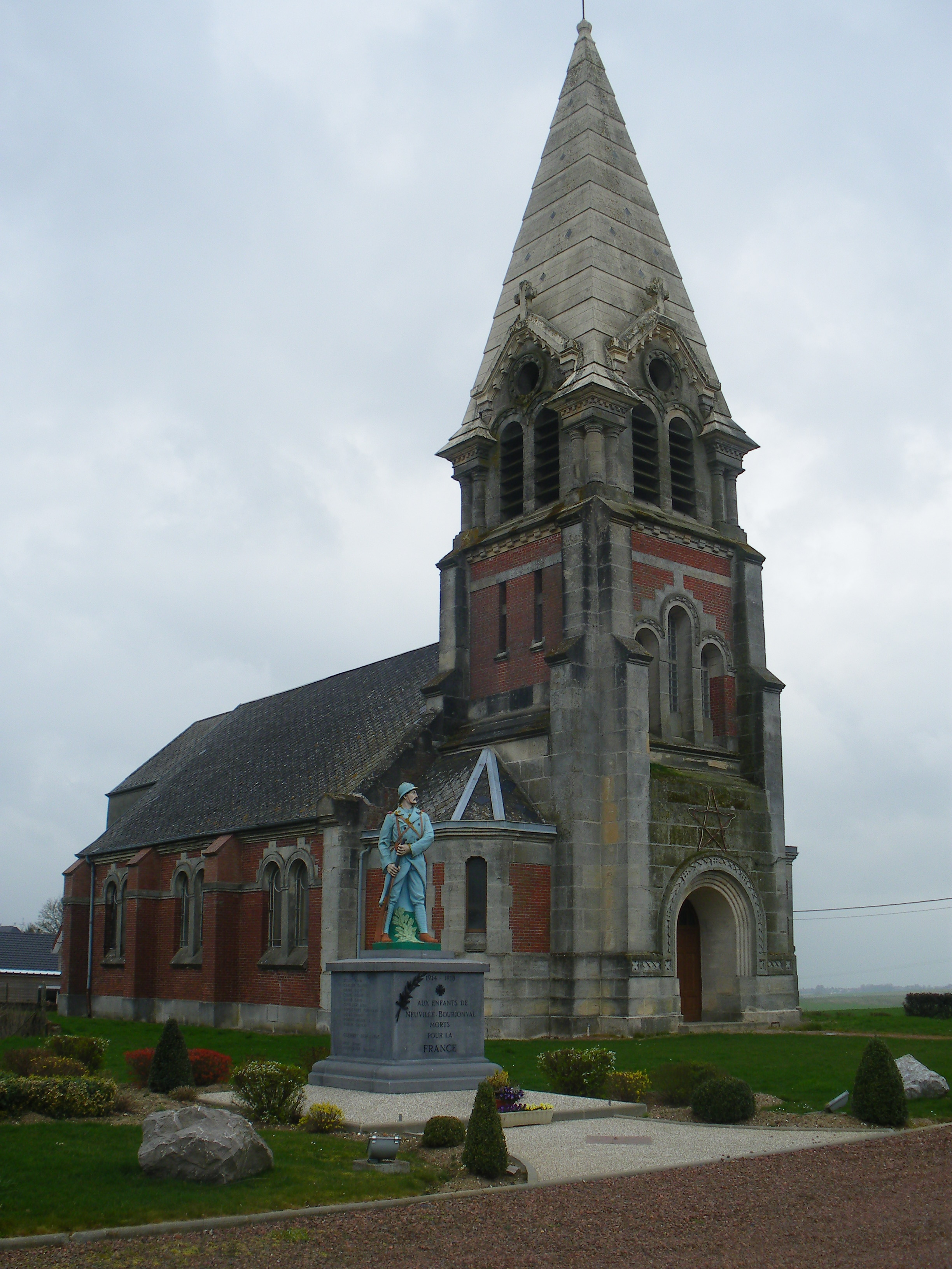 Vue de l'église Saint-Pierre et du monument aux morts de Neuville-Bourjonval.